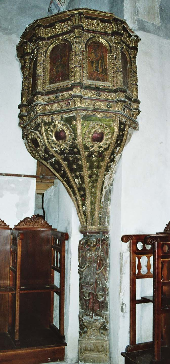 Kanzel in der orthodoxen Marienkirche von Labova e Kryqit (Albanien)